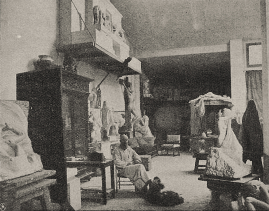 Atelier von Albert Bartholomé in Paris – veröffentlicht in Rhein und Düssel (No. 21), am 22. Mai 1904